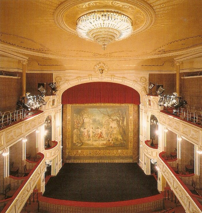 Teatr Polski w Bielsku-Białej, scena z zabytkową kurtyną z 1890 r.